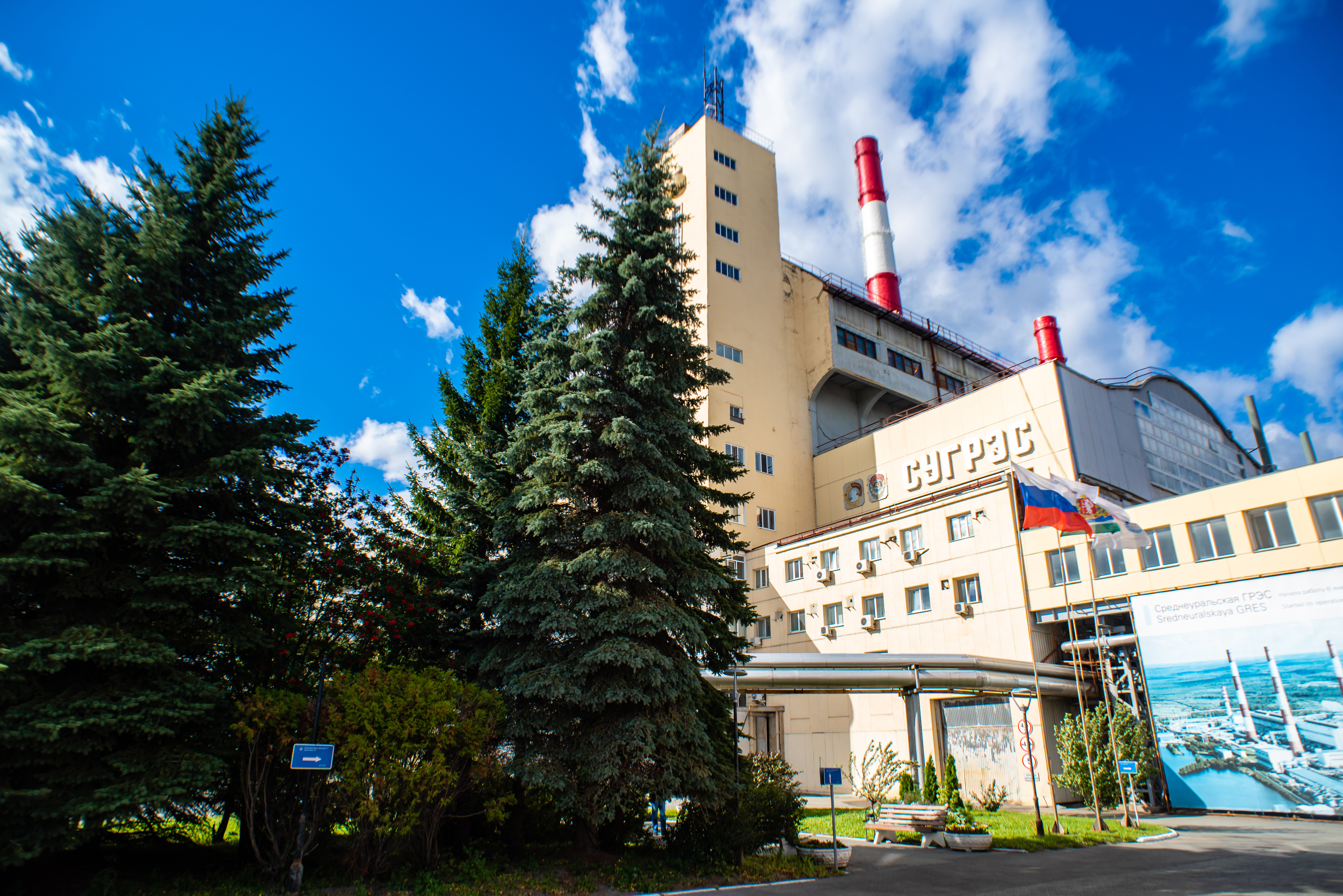 Изображение Среднеуральской ГРЭС